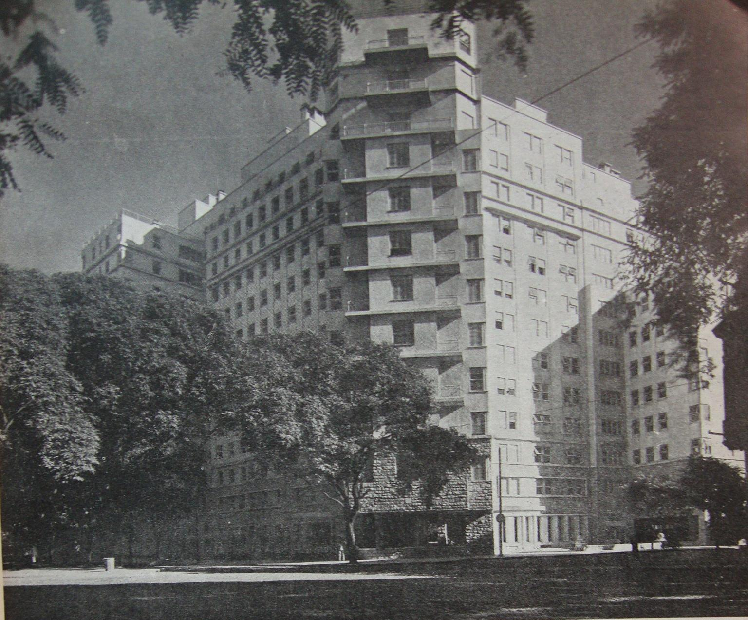 Vista desde Avenida Las Heras y Ugarteche del edificio de departamentos llamado Palacio de los Gansos. Buenos Aires, Argentina.